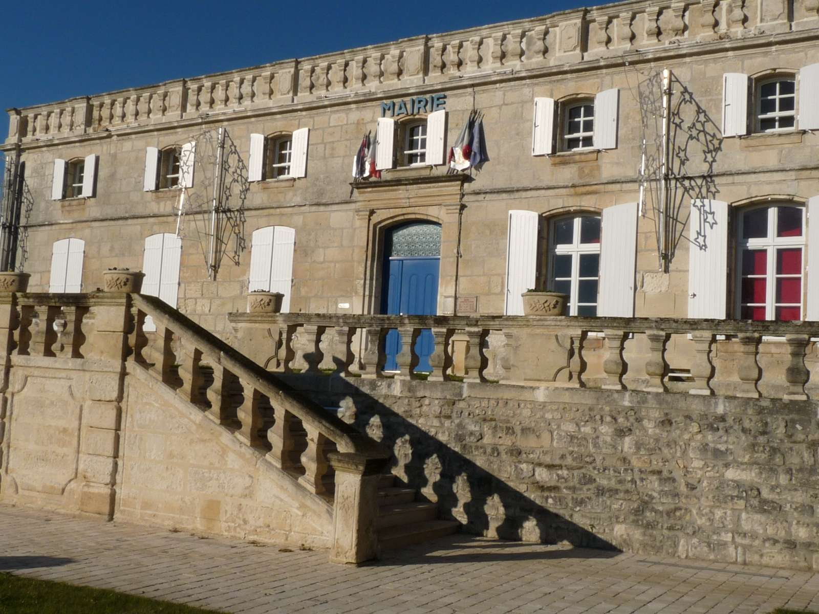 mairie de Sireuil, Charente, France